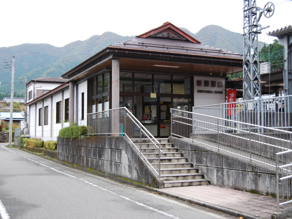 東武鉄道鬼怒川線・野岩鉄道会津鬼怒川線新藤原駅駅舎全景（2008/10/26撮影）